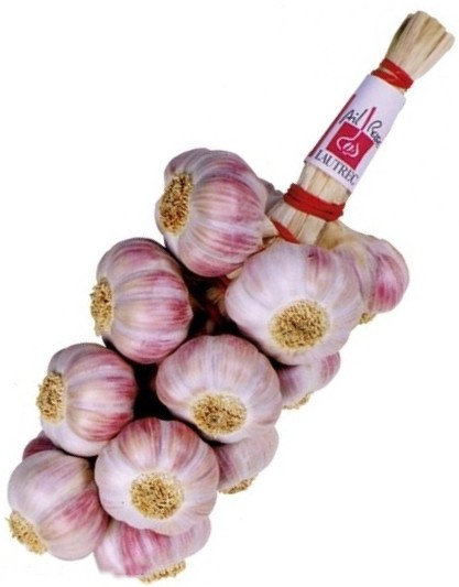 Manouille 1 kg d'Ail Rose de Lautrec Label Rouge et IGP